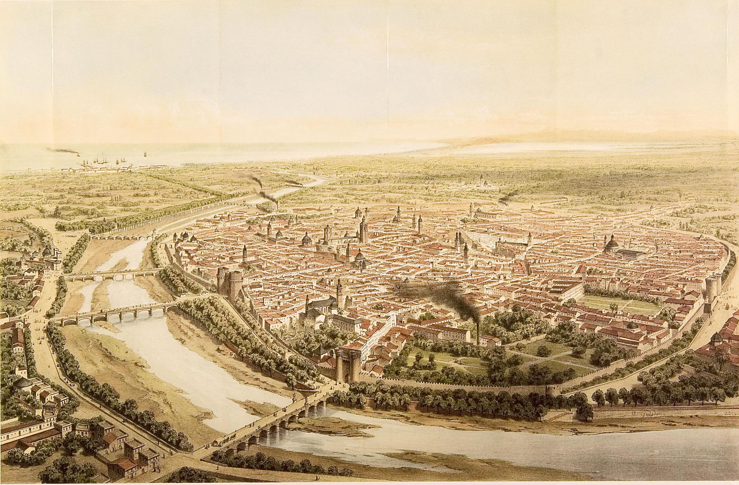 Vista de València en la dècada de 1830, dibuixada per Alfred Guesdon.